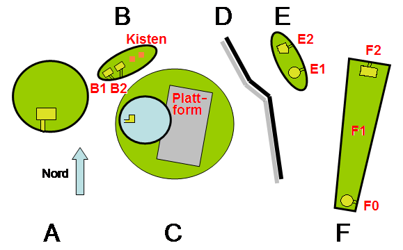 Bougon